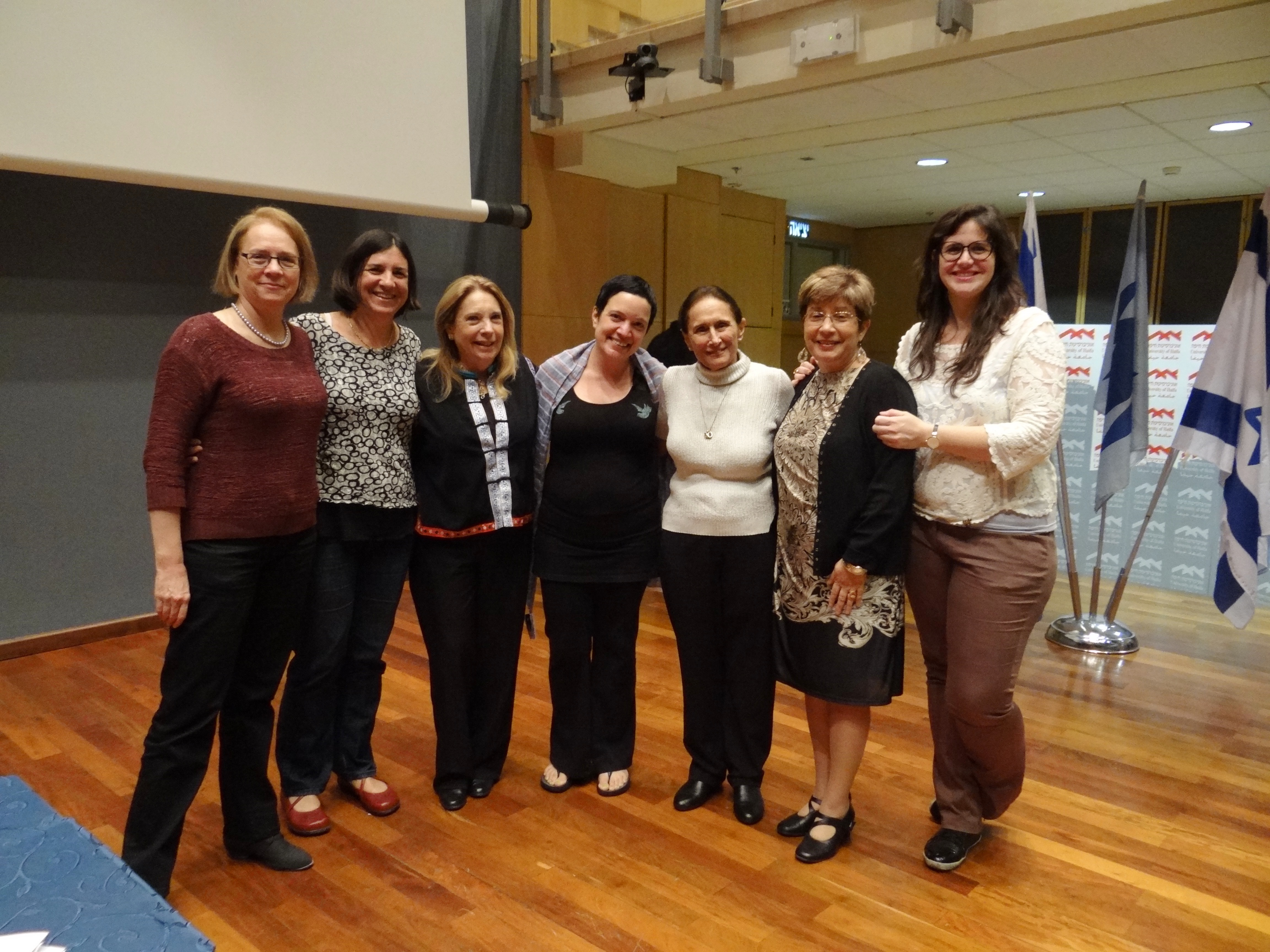 יעל דיין מרצה על ספרה החדש "מנגד" במסגרת סדרת הרצאות על נשים ופועלן שמתקיימת בתוכנית ללימודי נשים ומגדר באוניברסיטת חיפה ראו כאן עורכת הסדרה עם פרופסור ניצה בן דוב מאוניברסיטת חיפה יעל עם מרצות בתוכנית שנייה מימין ד"ר שרון הלוי מנהלת התוכנית שלישית משמאל היא פרופסור ניצה בן דוב